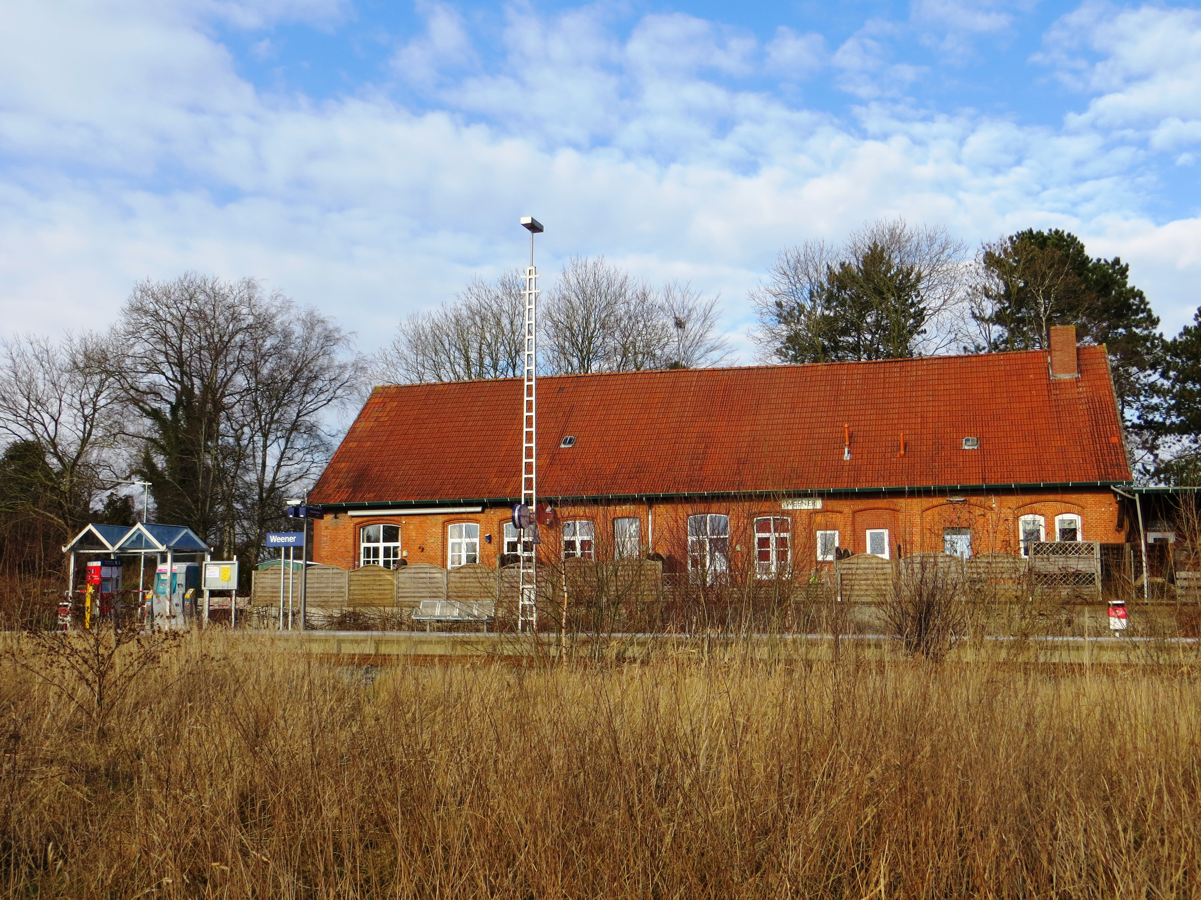 Weener (station)